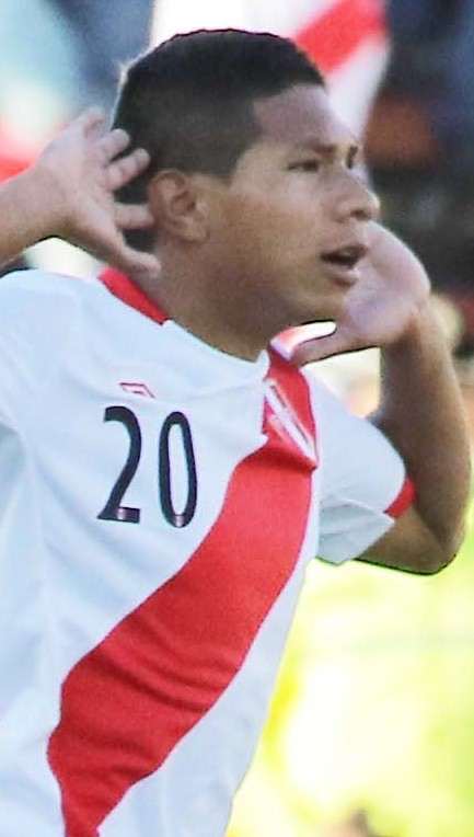 Quito 5 Sep (Andes).- Encuentro por eliminatorias Rusia 2018 entre Ecuador y Perú. Fotografías: Carlos Rodríguez/Andes.